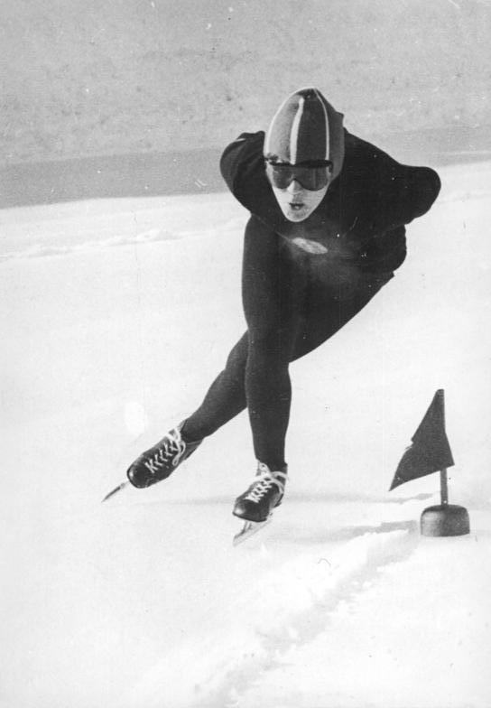 Helga Haase Zentralbild ATP 3.2.1960 DDR-Olympiateilnehmer für die gemeinsame deutsche Mannschaft zu den 8.Olympischen Winterspielen in Squaw Valley vom 18. bis 28.2.1960 UBz: Eisschnelläuferin Helga Haase. Abgebildete Personen: Haase, Helga: Eisschnelläuferin, Ehefrau von Helmut Haase, DDR